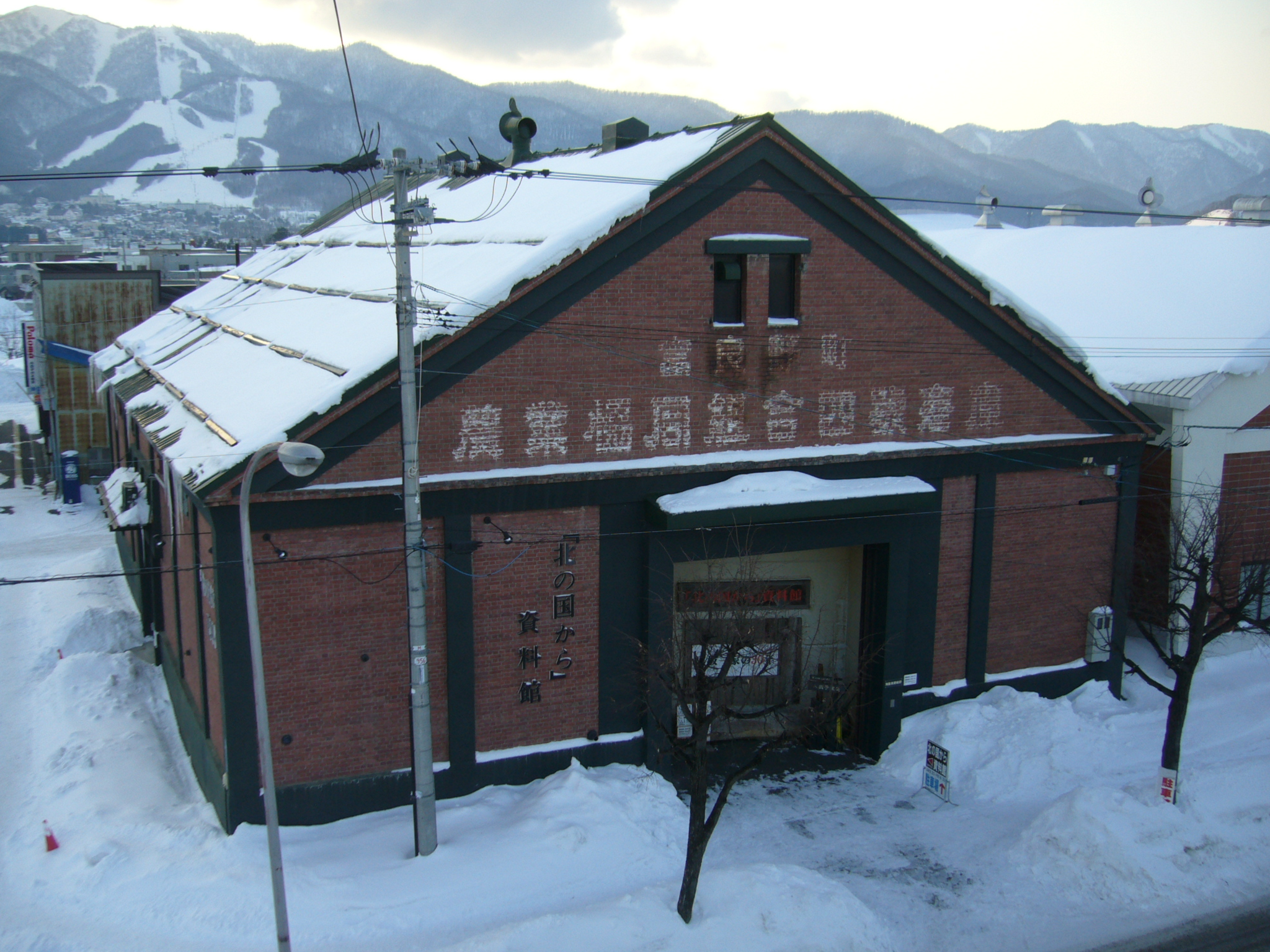 北の国から資料館